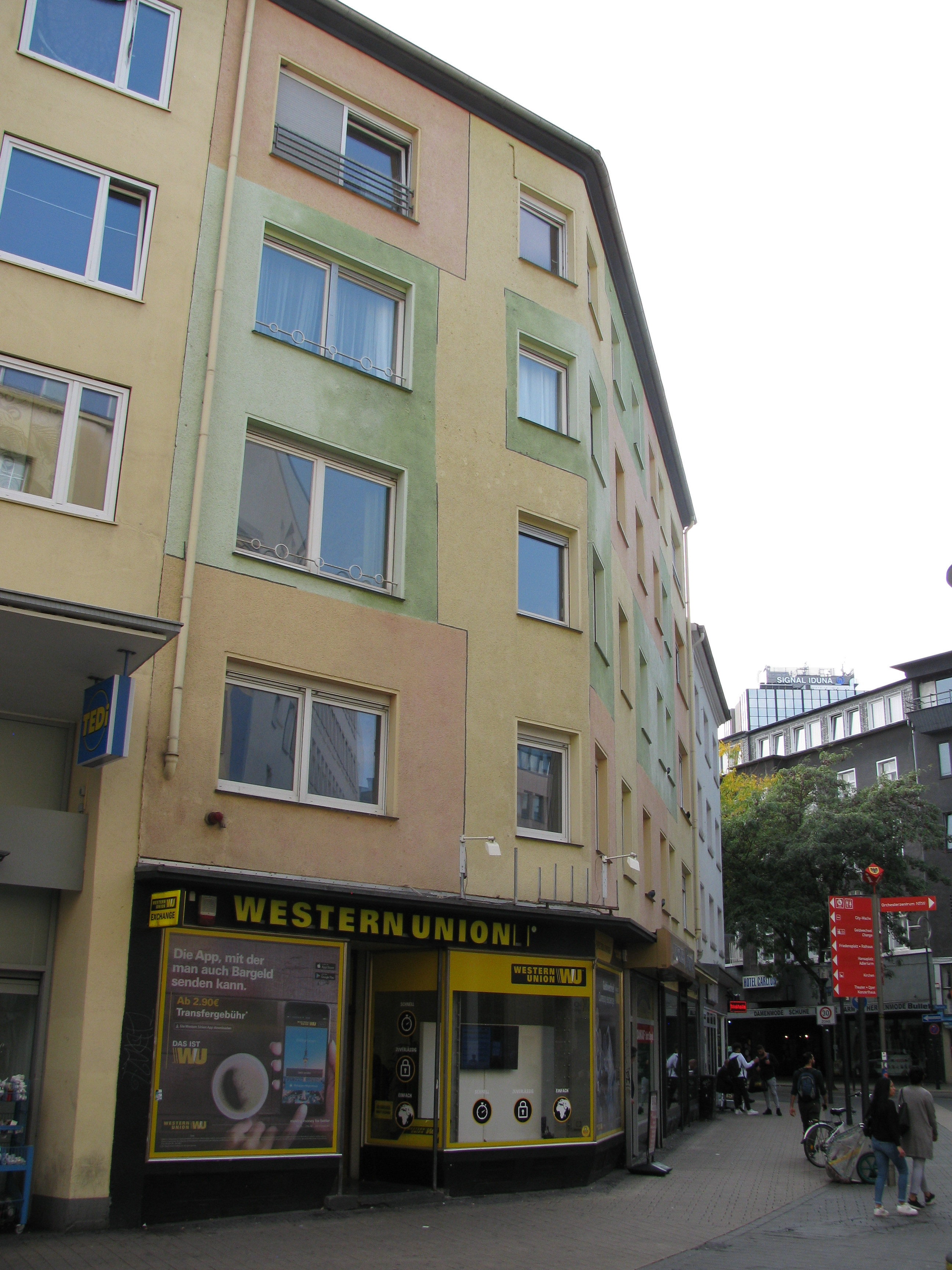 das Haus Lütge Brückstraße 2 in Dortmund